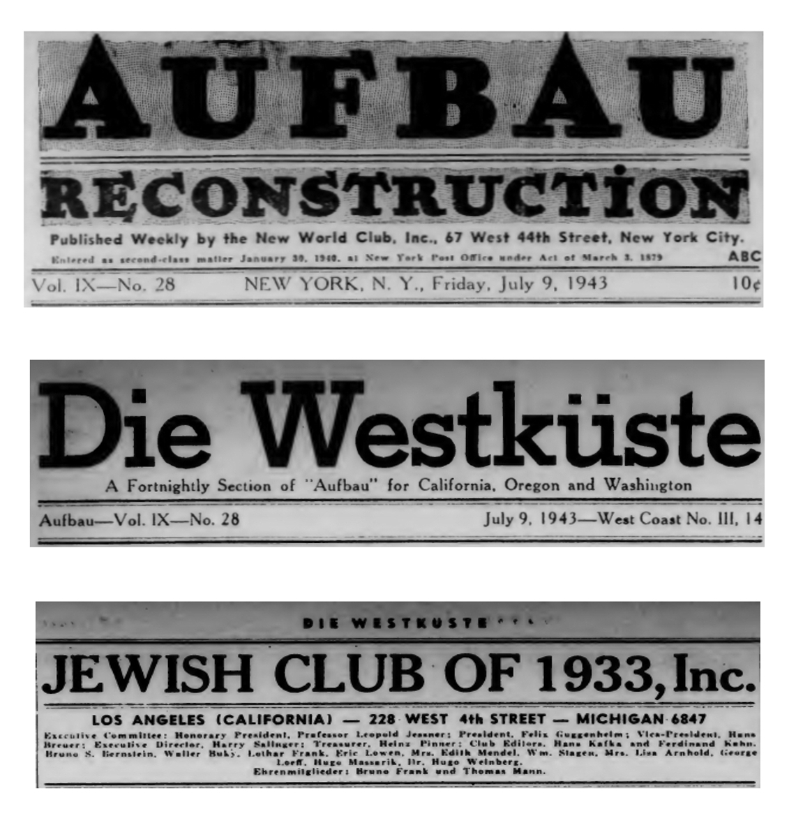 Titellogo der Exilzeitschrift „Aufbau“, Logo der Beilage „Die Westküste“ und Seitenlogo des „Jewish Club of 1933“, 1943.